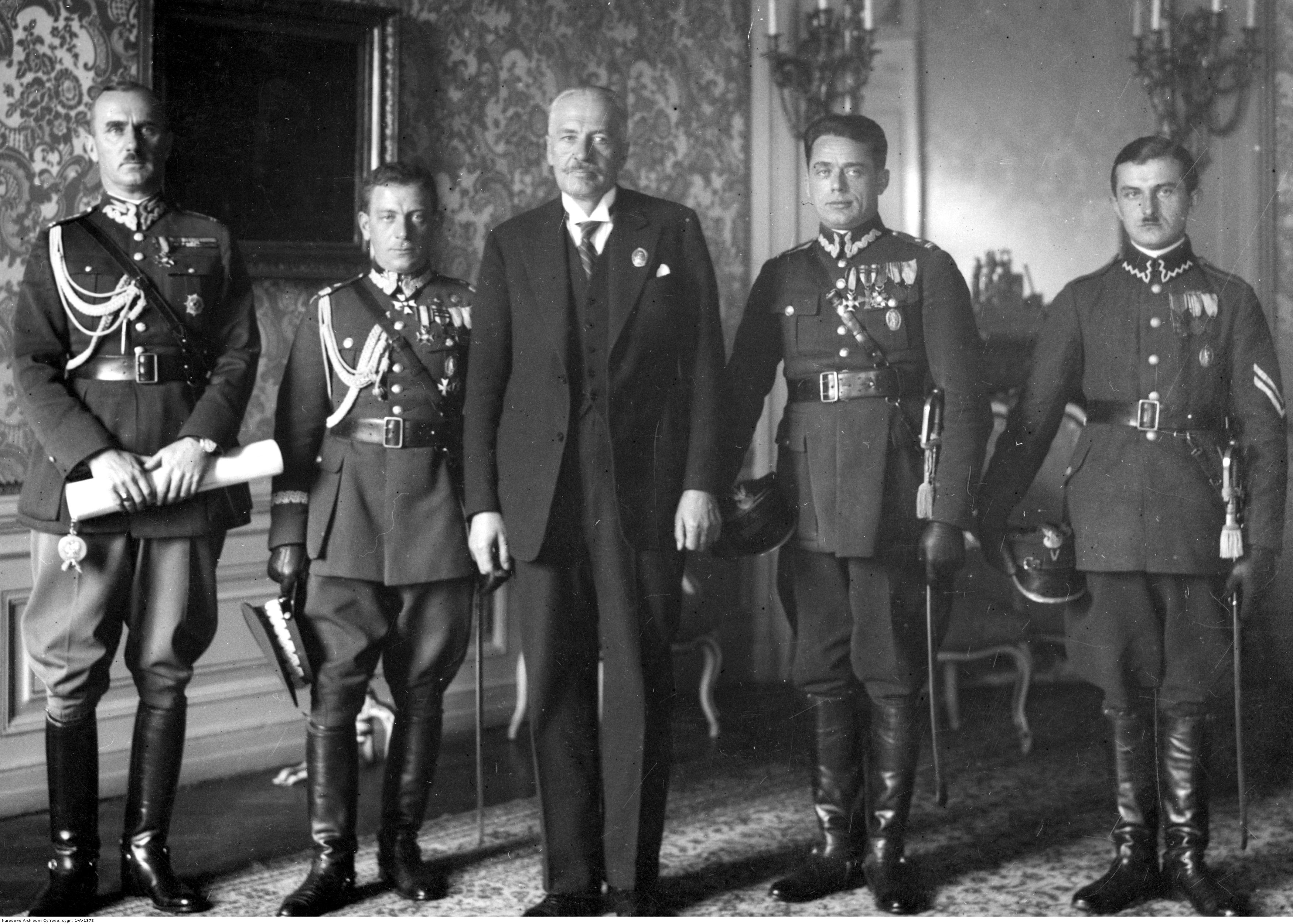 Wręczenie prezydentowi RP Ignacemu Mościckiemu odznaki pamiątkowej przez delegację Korpusu Ochrony Pogranicza. Delegacja KOP w towarzystwie prezydenta RP Ignacego Mościckiego. Widoczni m.in. generał Stanisław Tessaro (drugi z lewej), pułkownik Jan Głogowski (pierwszy z lewej). Koncern Ilustrowany Kurier Codzienny - Archiwum Ilustracji. Sygnatura: 1-A-1378